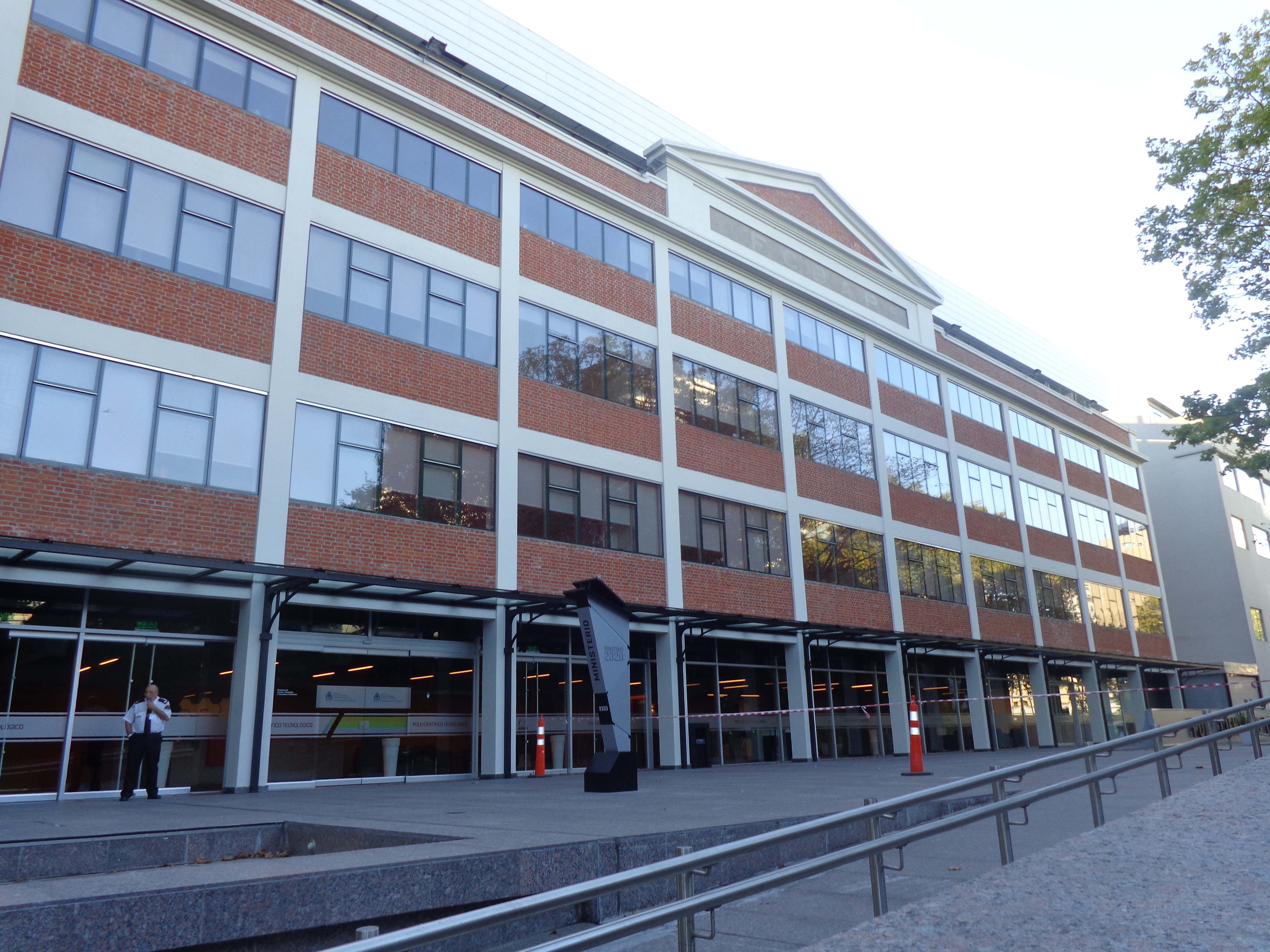 Polo Científico Tecnológico, Buenos Aires, Argentina